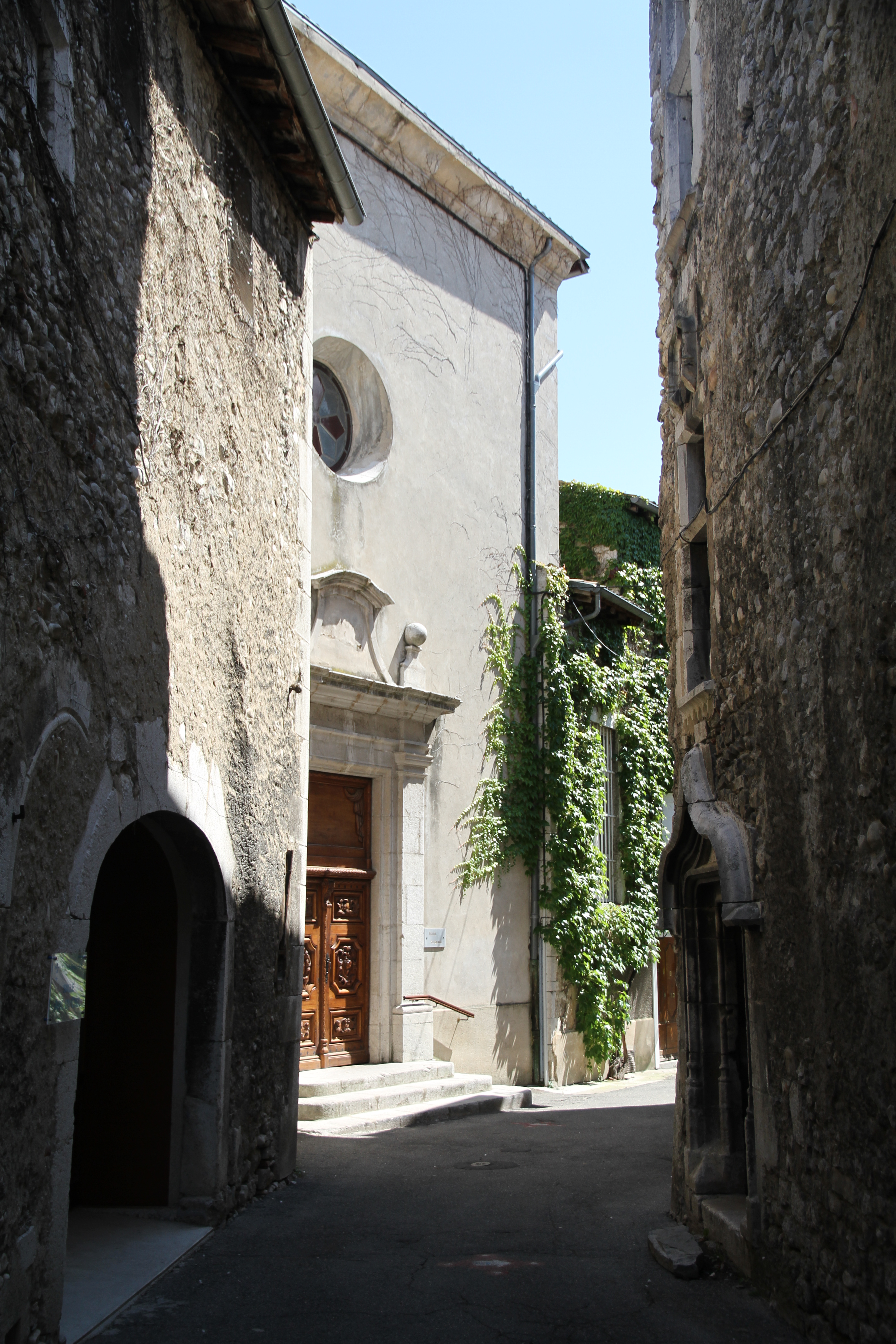 vue depuis la rue qui mène à la cathedrale .